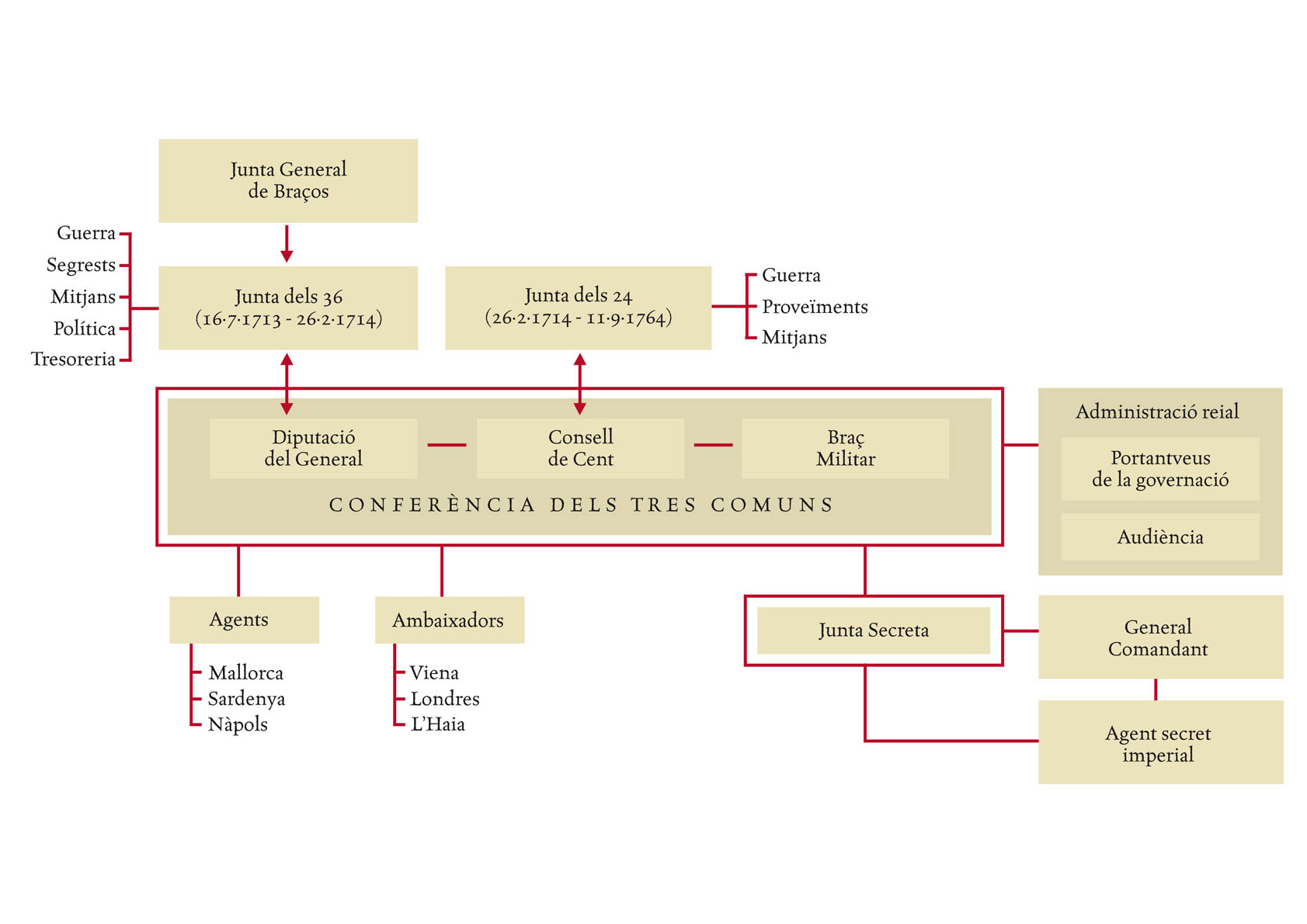 Esquema de la Conferència dels Tres Comuns durant la Guerra de Successió espanyola. Aquest era un òrgan deliberatiu i executiu format per la Diputació del General, el Consell de Cent i el Braç Militar, pel qual van passar totes les grans decisions preses pel país fins a la caiguda de Barcelona. Tot i que aquest entramat conformava un govern col•legiat i de fet republicà, es mantingué formalment la legitimitat tradicional mitjançant la figura del portantveus de la governació general, encarregat de substituir el lloctinent o virrei en absència d’aquest. Com que el darrer lloctinent,el general Starhemberg, s’havia absentat del país corresponia al portantveus assumir totes les seves competències, incloses les d’ordre públic i justícia –i presidir, per tant, l’Audiència de Catalunya. La Junta dels Trenta-sis va nomenar Antoni de Villarroel general-comandant de la plaça, però aquest acceptà provisionalment el càrrec a l’espera de la seva confirmació per part de Carles III. La confirmació degué arribar el 2 d’octubre de 1713, amb l’entrada a Barcelona de Joan Francesc Verneda. Aquest, cunyat de Ramon Vilana-Perles, secretari d’Estat i de Despatx Universal a Viena, va restar durant la resta del setge a Barcelona en qualitat d’agent secret imperial. Representants dels Tres Comuns i el general-comandant van conformar la Junta Secreta, encarregada dels afers miltars. Des de la seva arribada, s’hi afegí també l’agent secret imperial. Des del 26 de febrer de 1714 el Consell de Cent es va fer càrrec del govern efectiu de la defensa, i va crear una junta executiva de 24 membres (Junta dels Vint-i-quatre, o Vint-i-quatrena), que assumí les competències de la Junta dels Trenta-sis. El nou organisme es subdividí en tres comissions: Guerra, Proveïments i Mitjans.